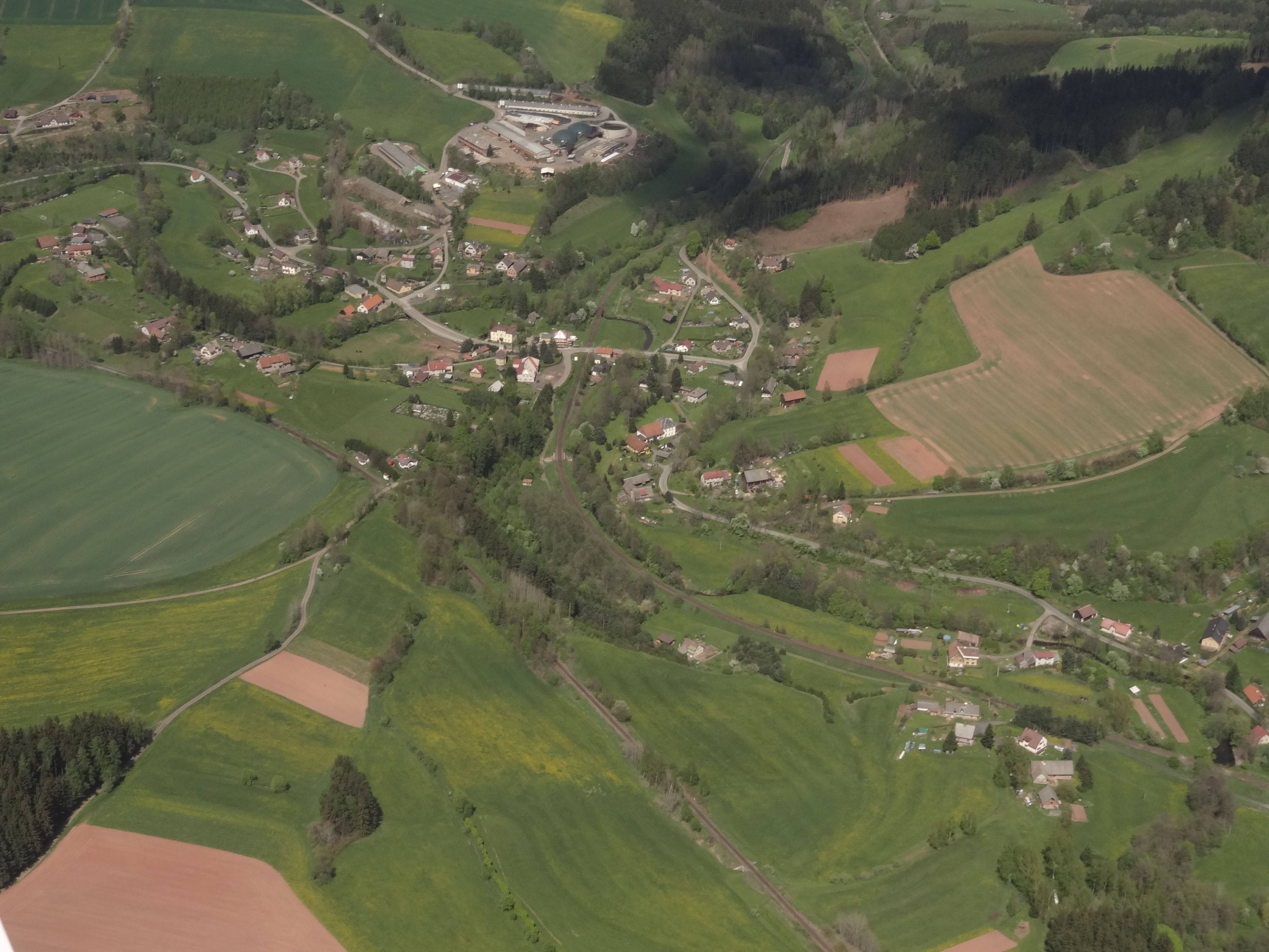 Bělá u Staré Paky z letadla